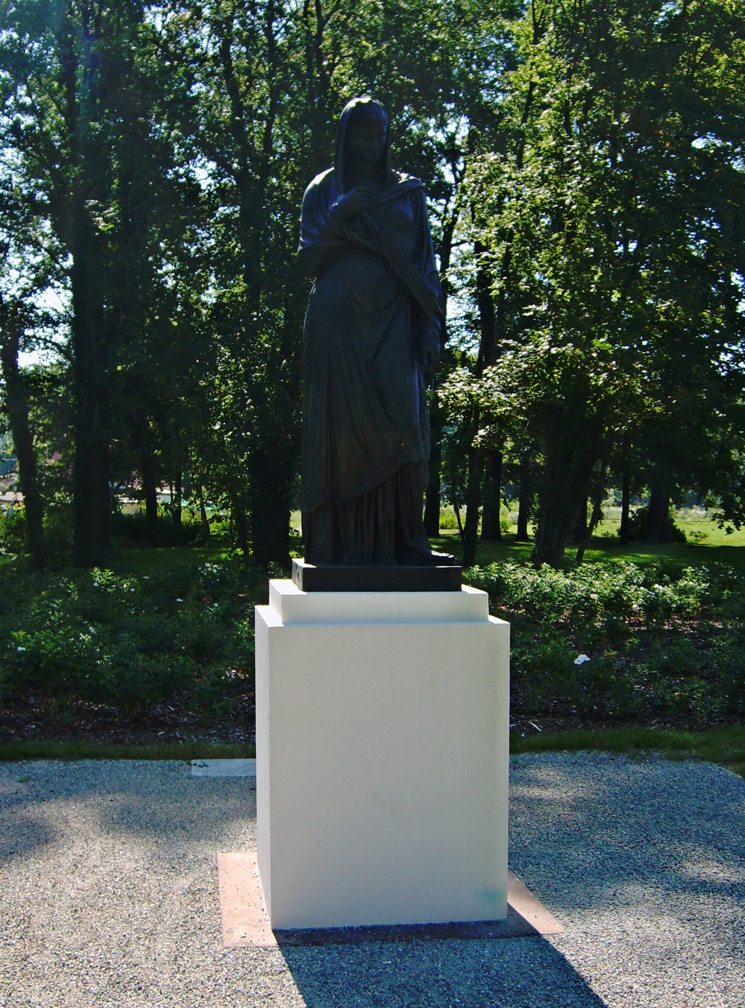 Kunstguss "Frau von Herkulaneum" im Schlosspark Lauchhammer-West